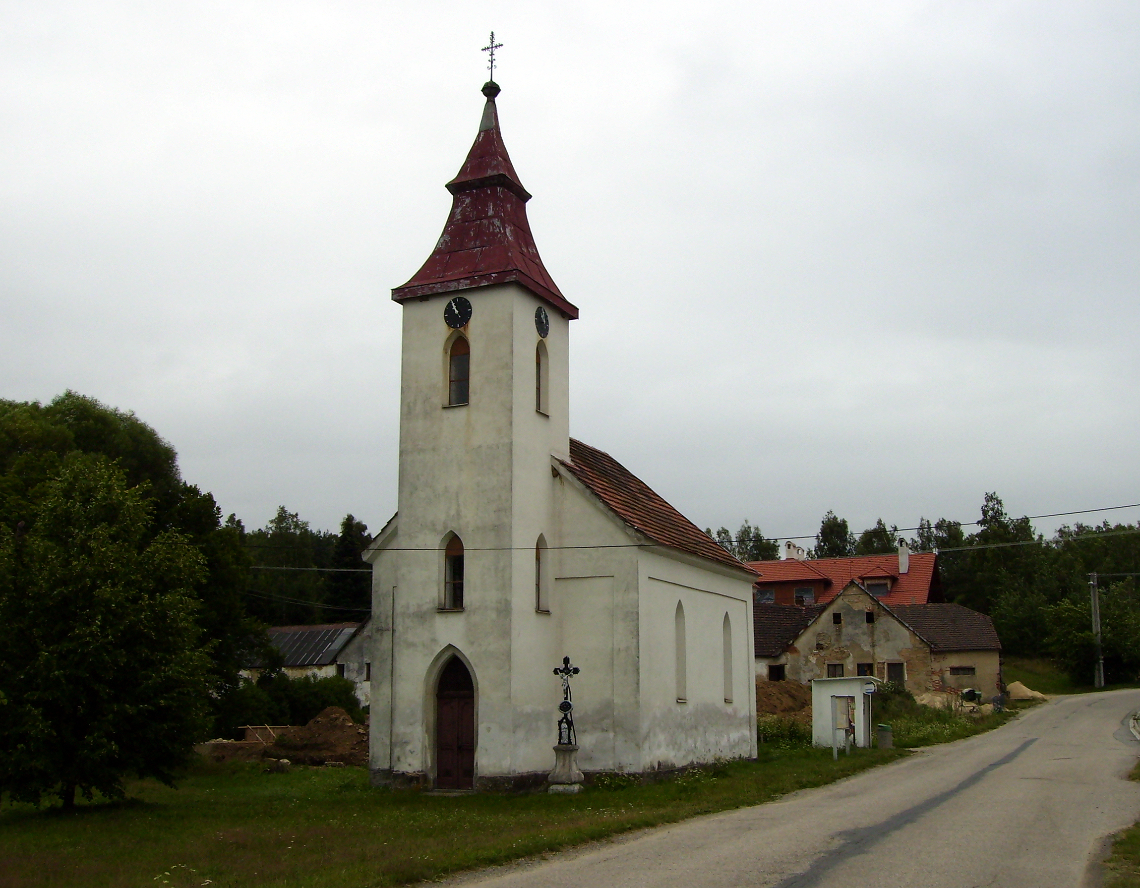 Kostelík ve vesnici Vlčice u Strmilova